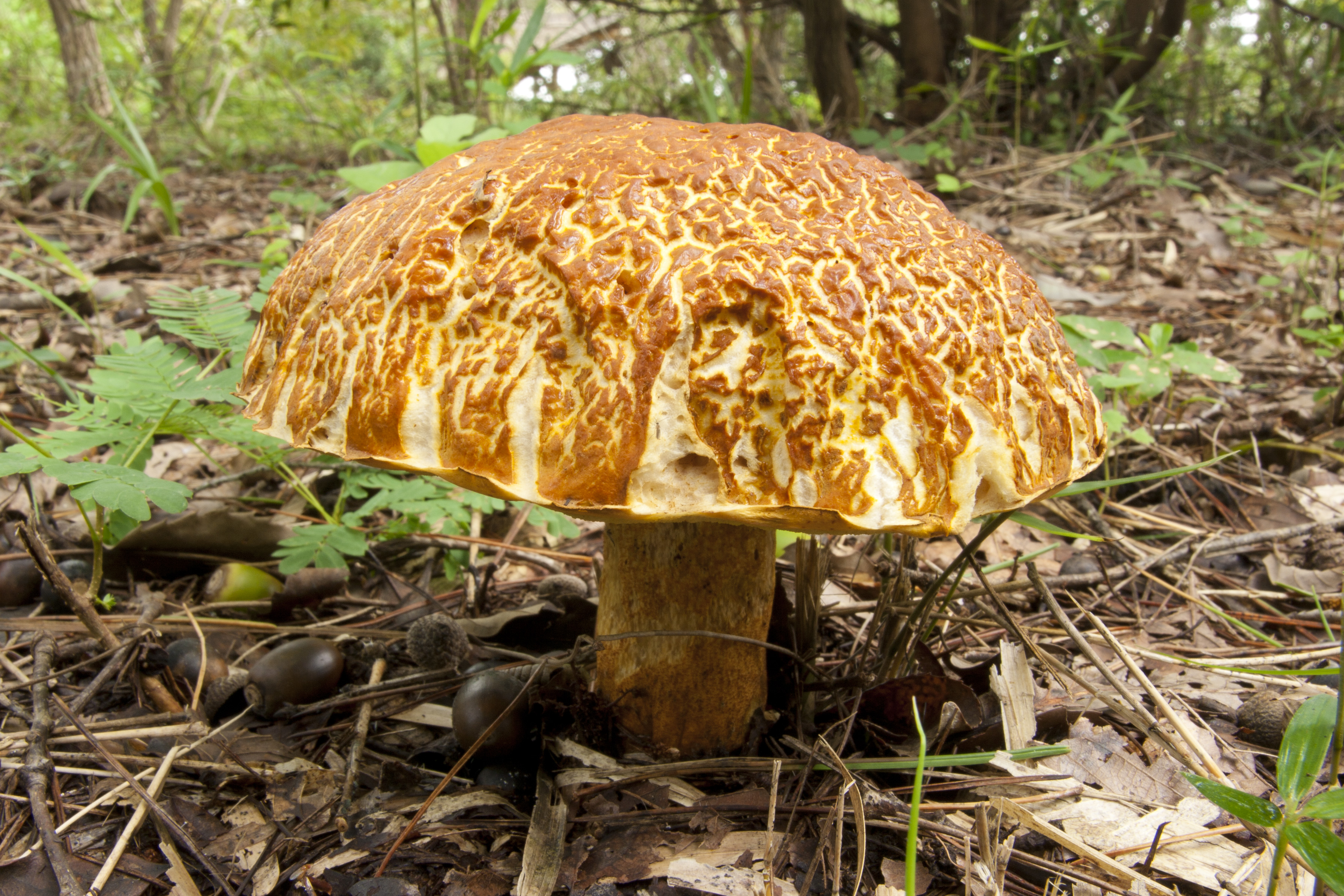 アカヤマドリ (学名:Leccinum extremiorientale)